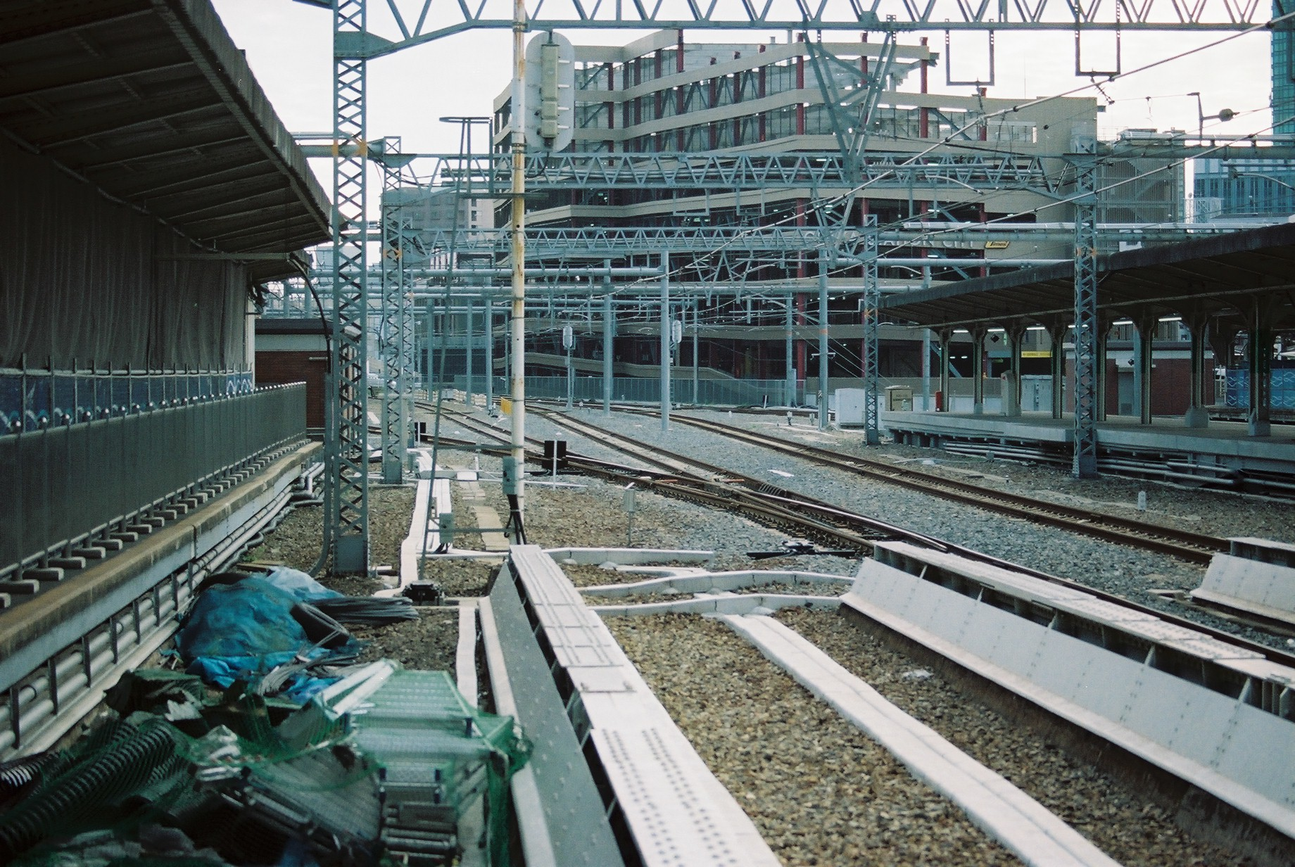 大阪駅の留置線撤去跡